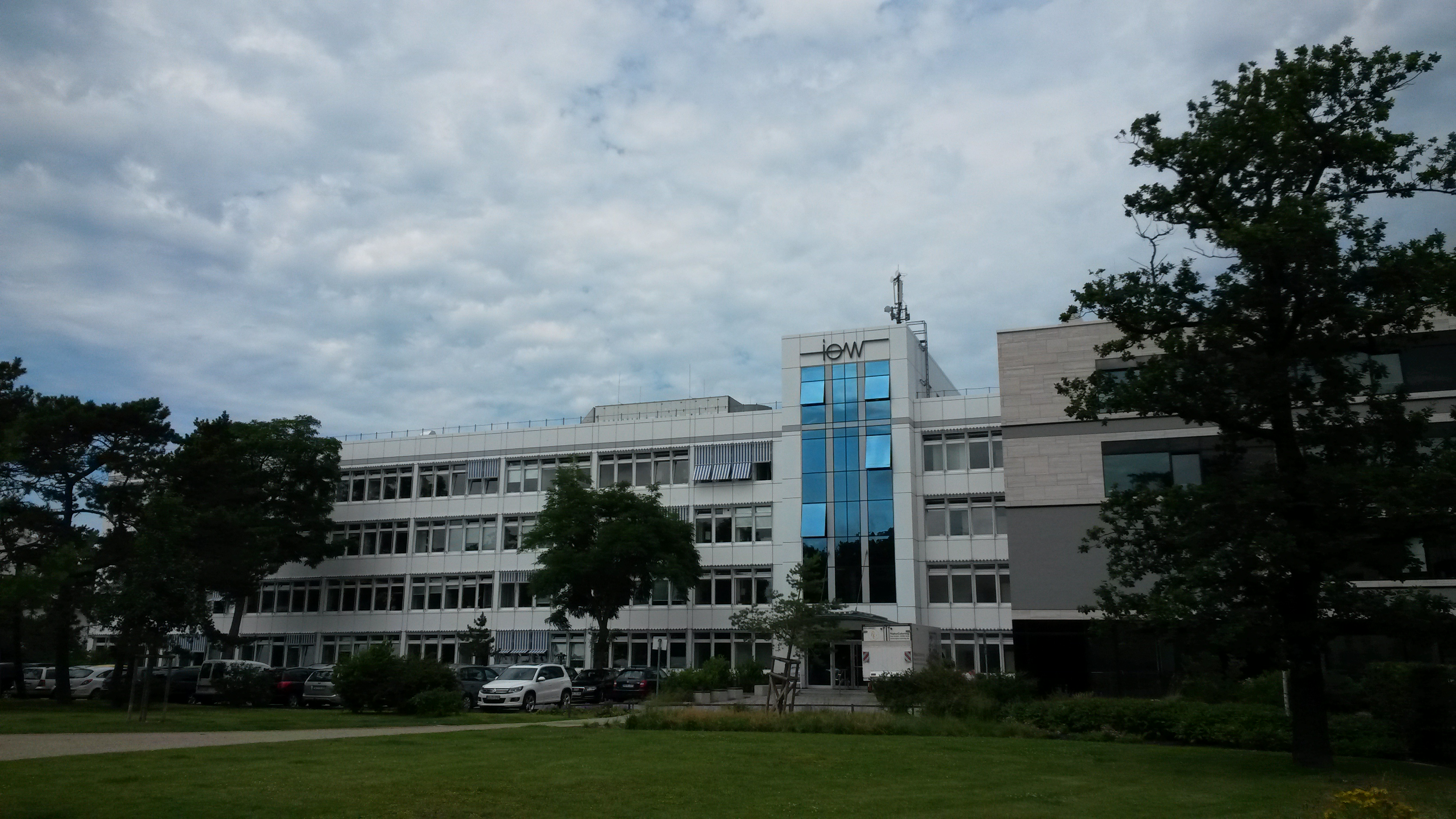 Das Leibniz-Institut für Ostseeforschung in Warnemünde